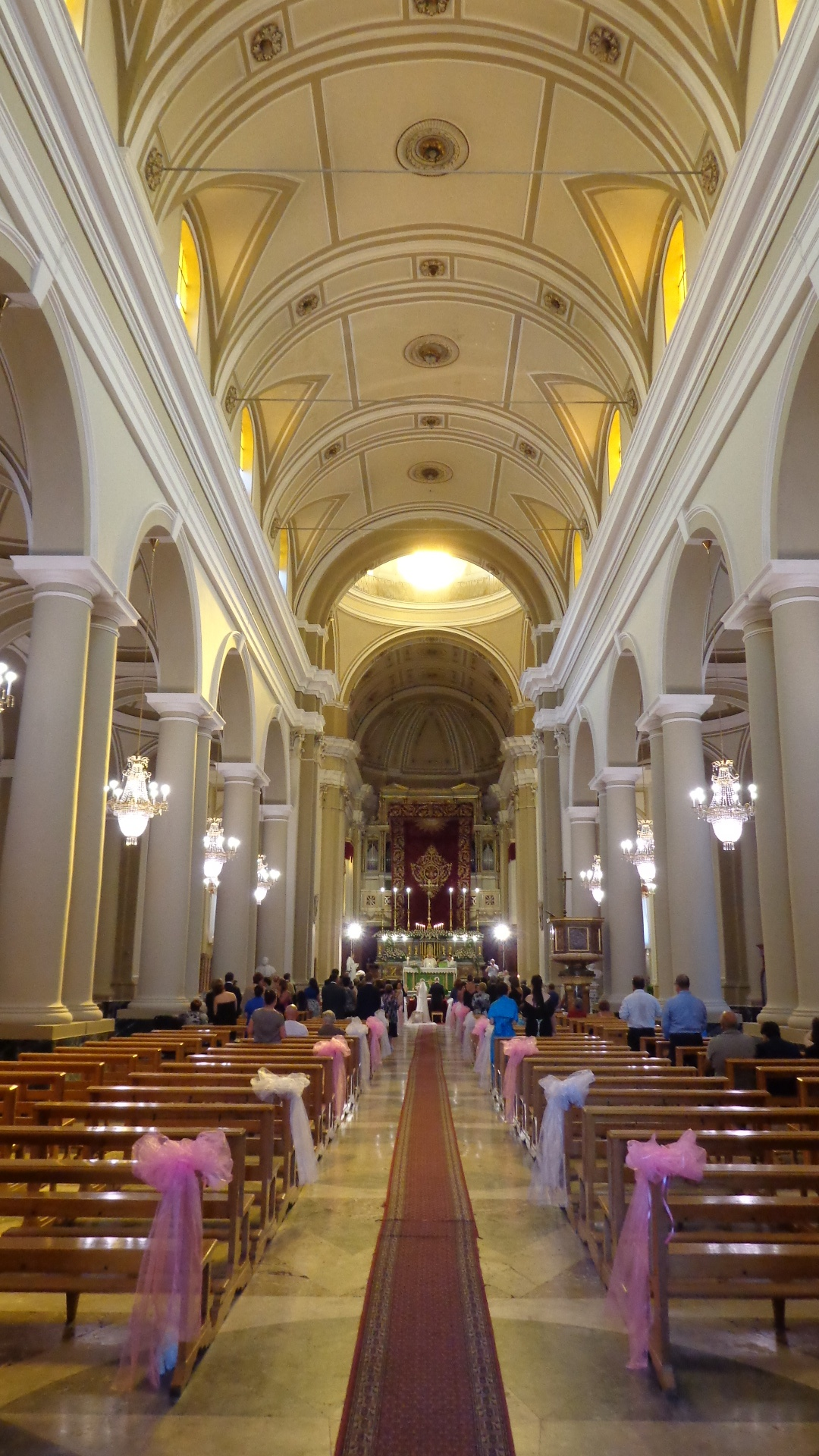 Navata